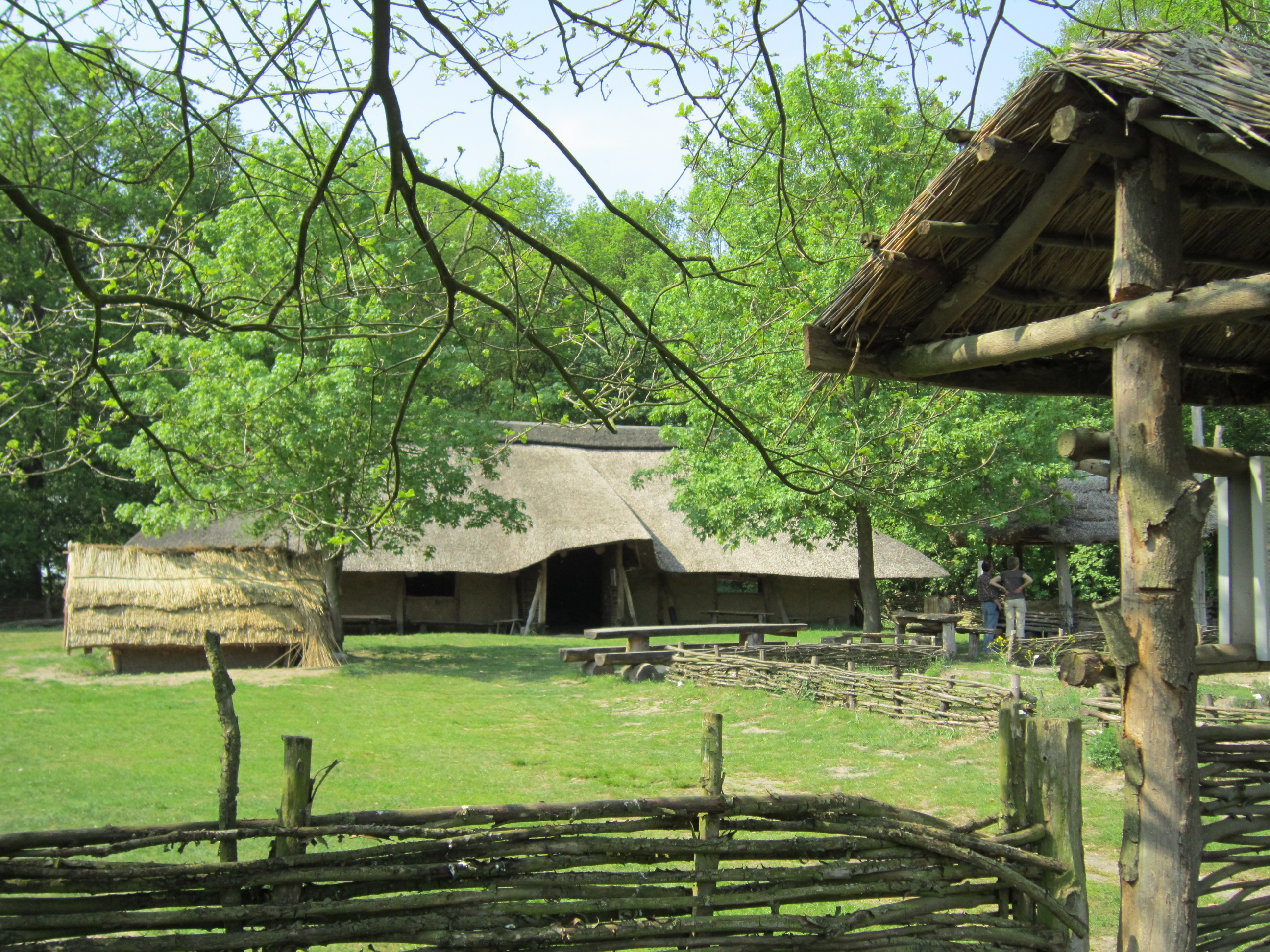 Sachsenhof in Pentrup (Greven, Kreis Steinfurt)